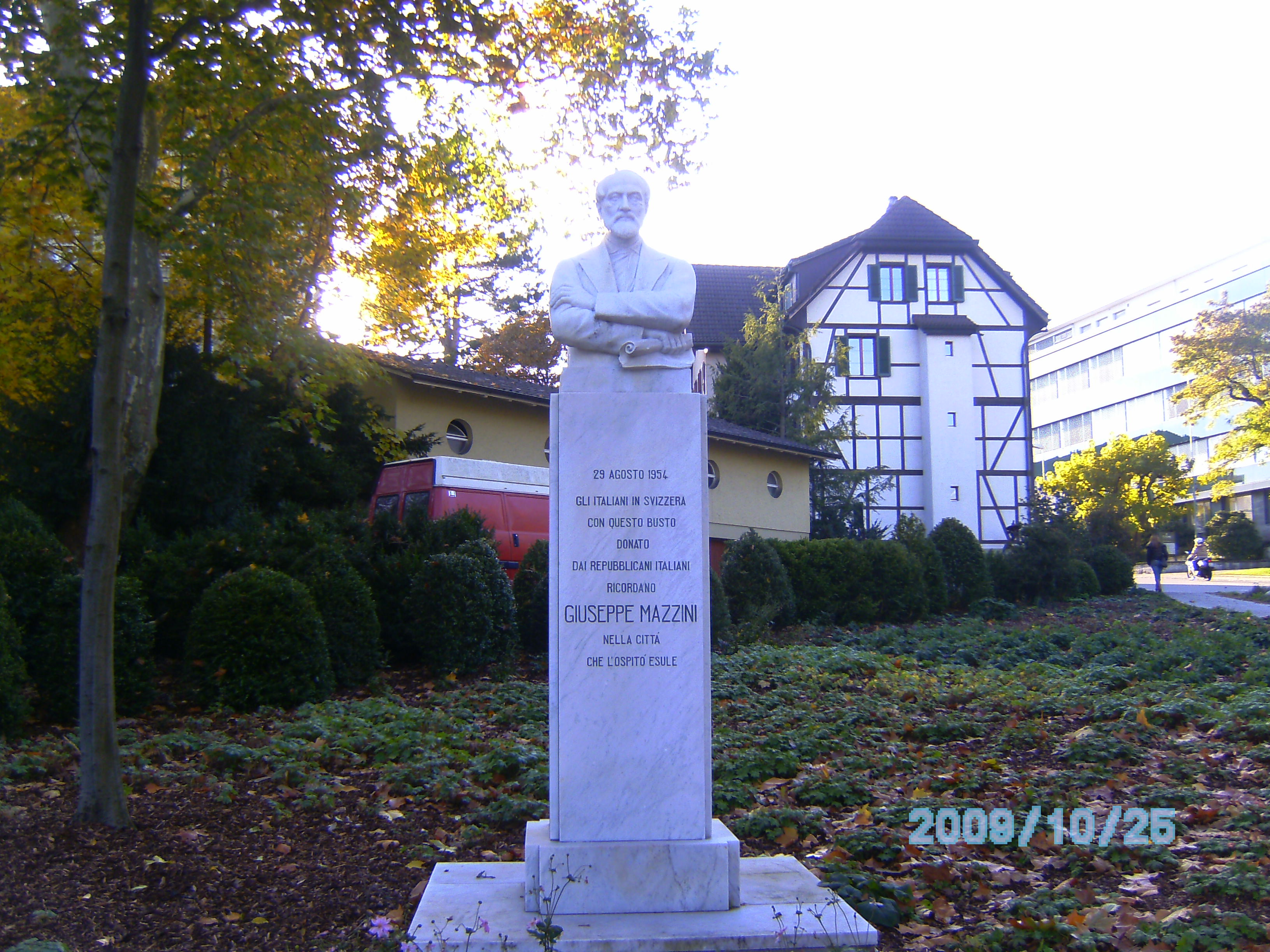 Giuseppe Mazzini 22. Juni 1805 in Genua; † 10. März 1872 in Pisa war Jurist, italienischer Demokrat und Freiheitskämpfer im Rahmen des Risorgimento